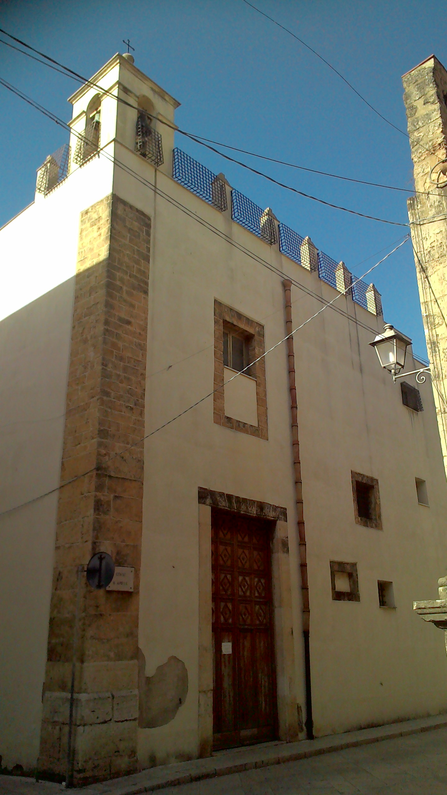 Facciata della chiesa